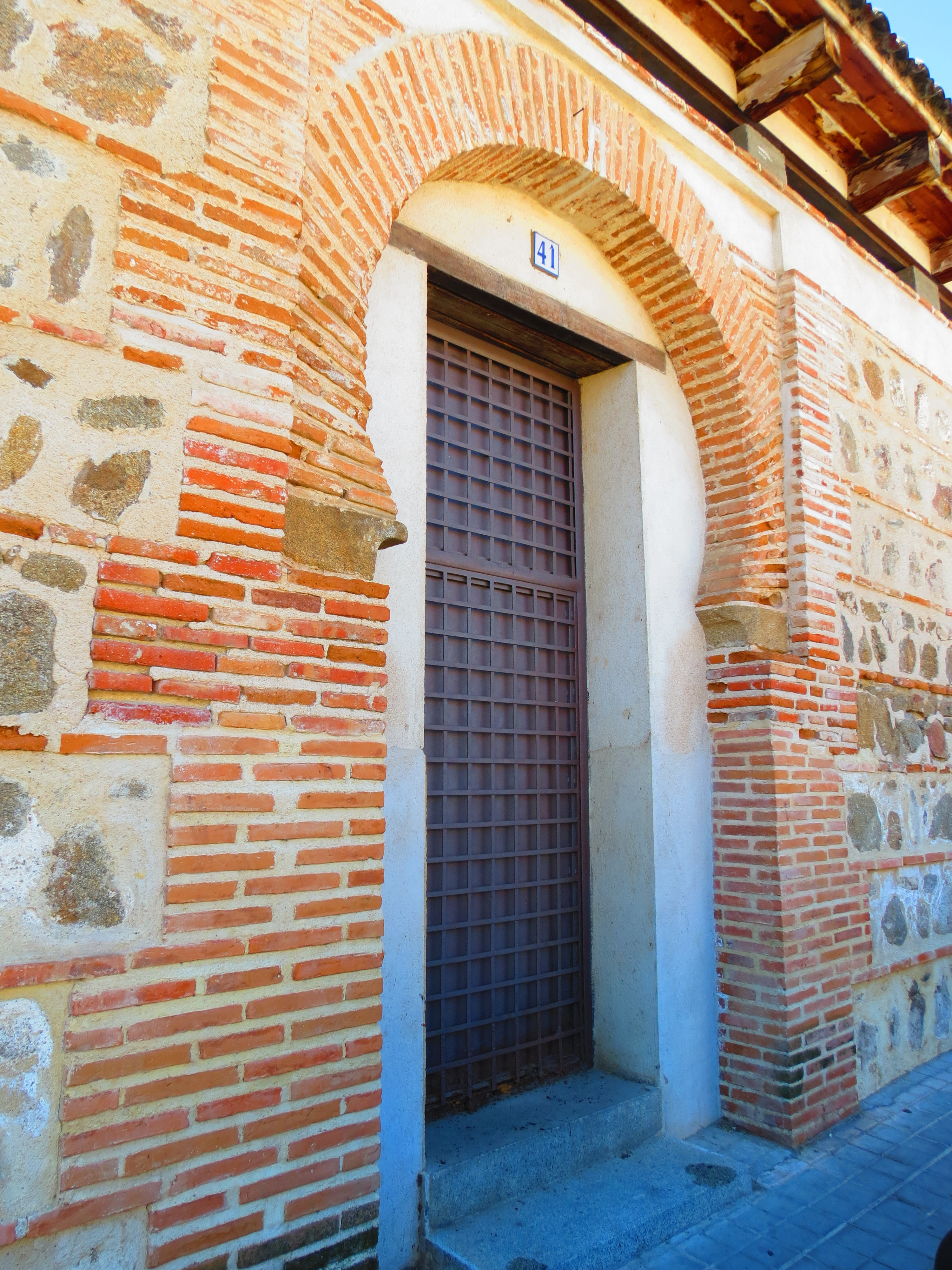 Puerta mozárabe en la iglesia de Santiago de los Caballeros en Talavera de la Reina (España)